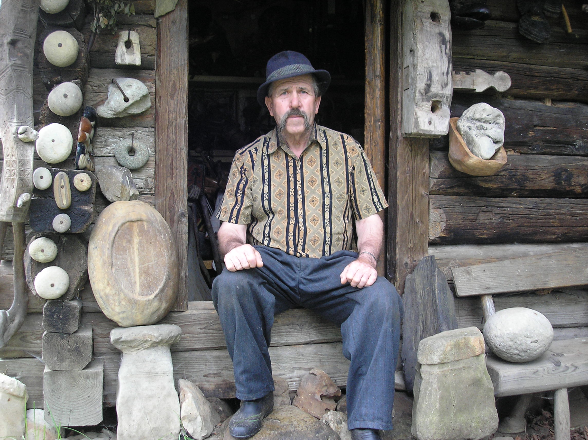 Засновник музею Олекси Довбуша Михайло Дідишин на порозі музею, с.Космач